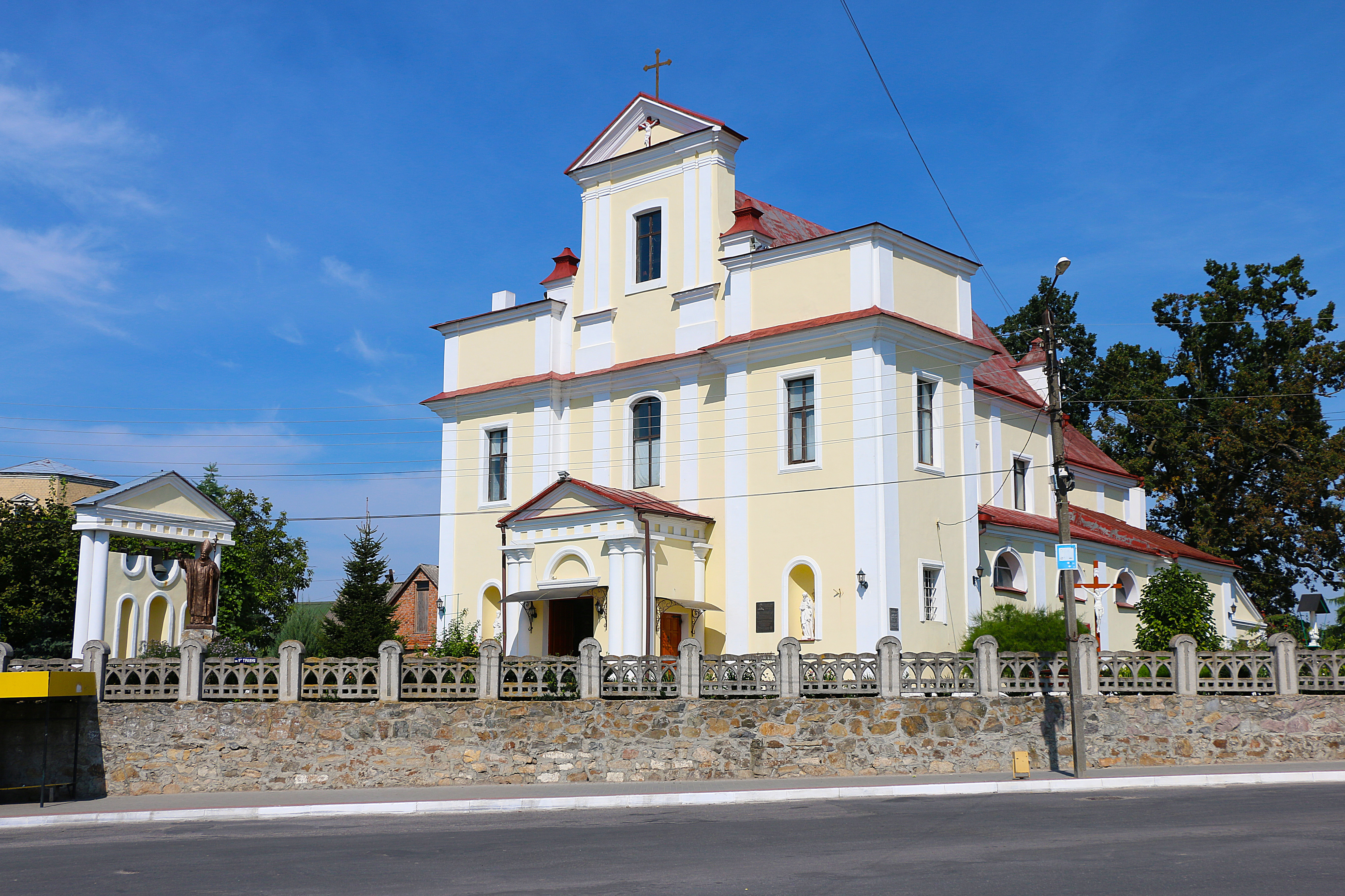 Костел Усікновення Глави Йоана Предтечі (мур.), Хмільник, вул. Шевченка,7